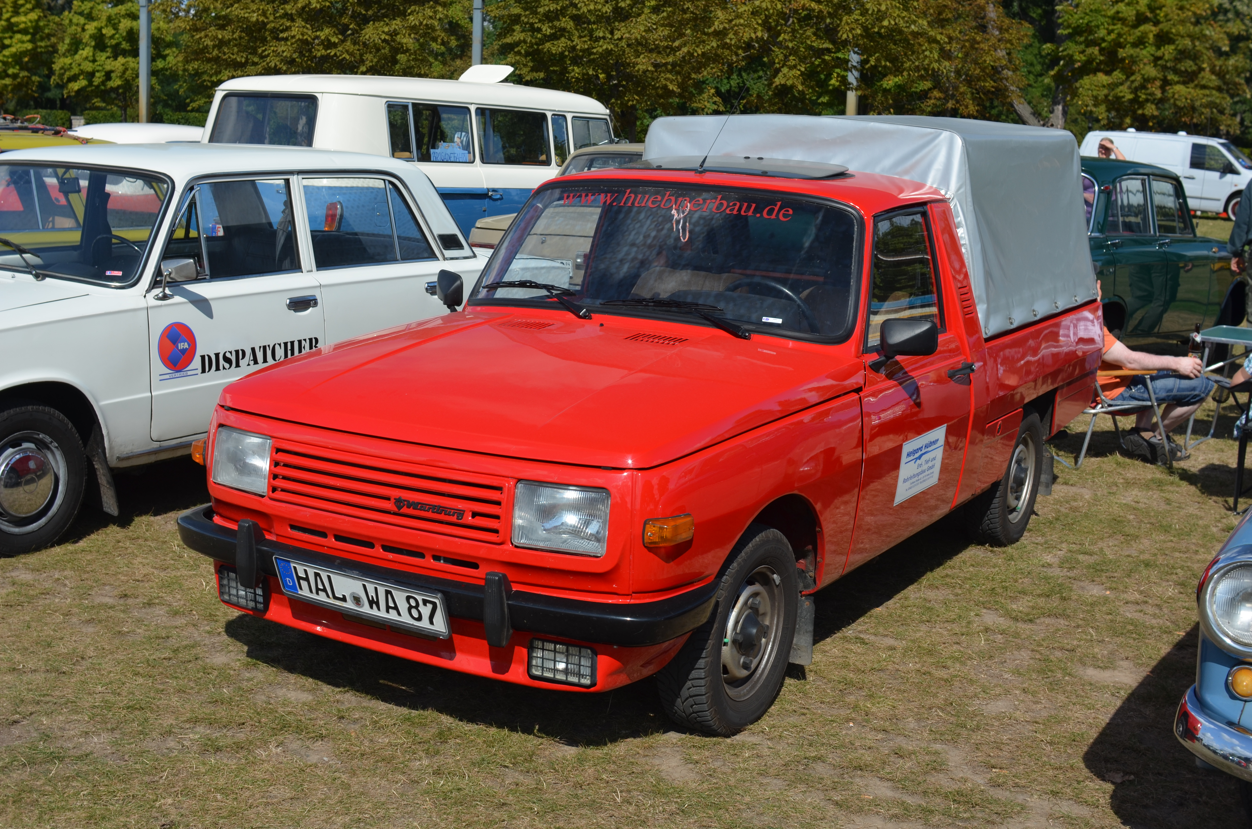 Wartburg